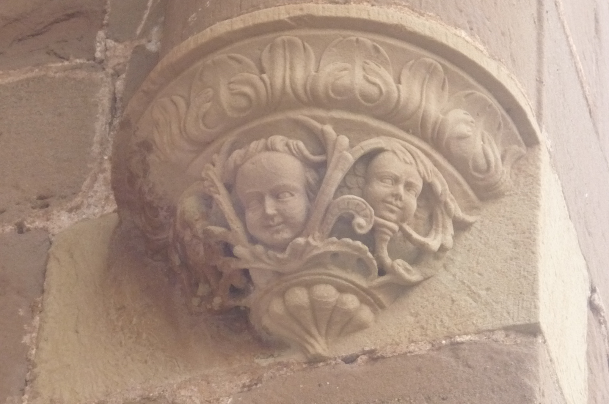 Capitel del exterior de la iglesia parroquial de Bezares (La Rioja, España)